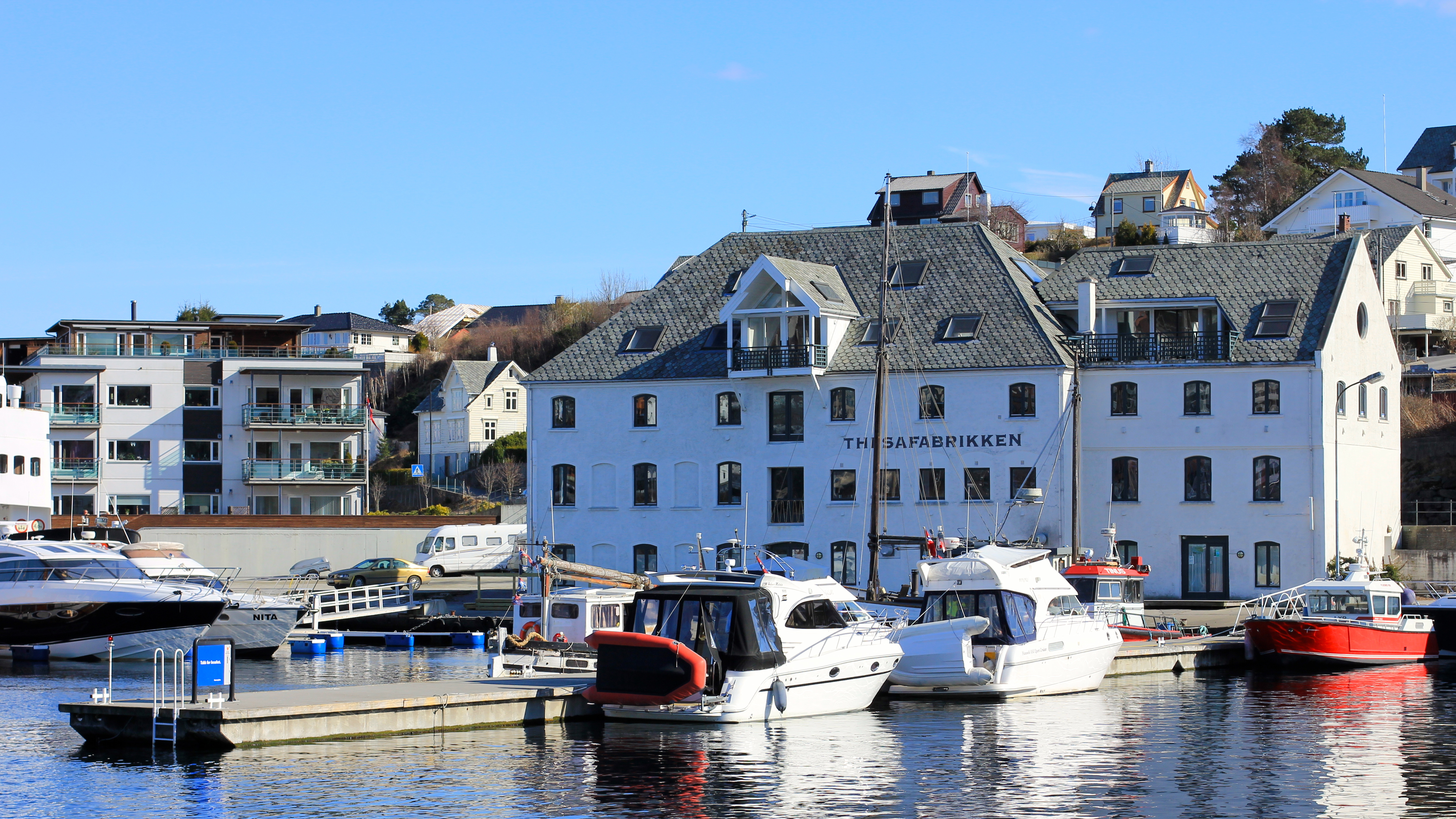 Thisafabrikken, Leirvik